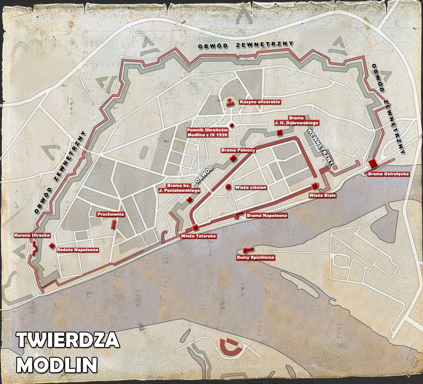 Plan Twierdzy Modlin